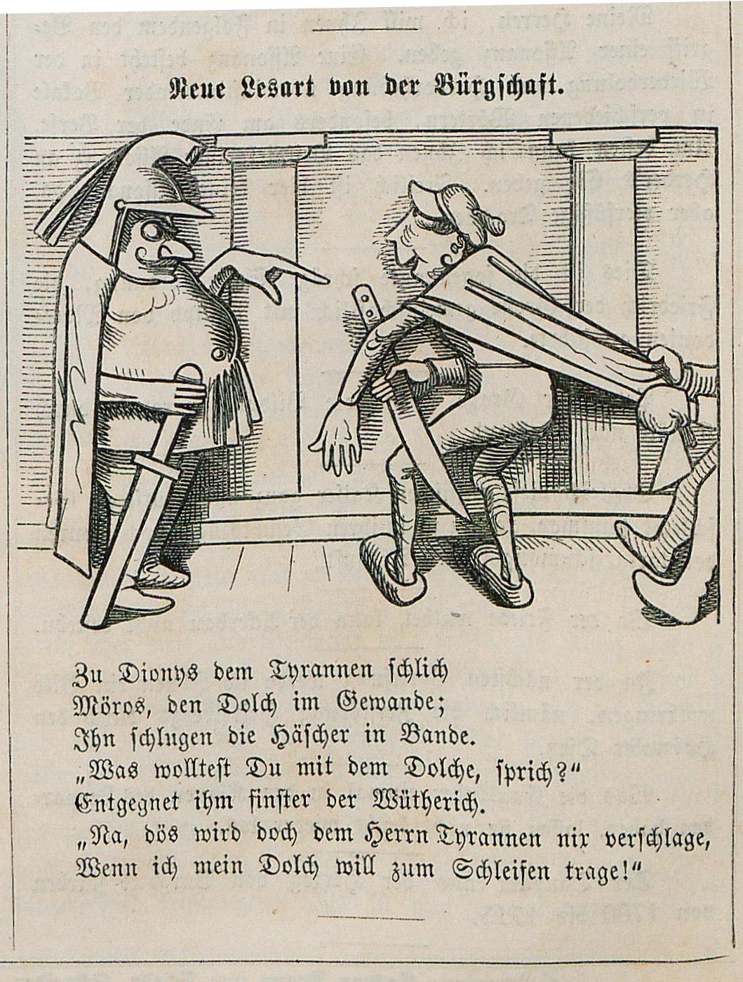 Parodie auf Schillers Gedicht "Die Bürgschaft" Fliegende Blätter, 39.1863, Nr. 945, S. 55 rechts unten